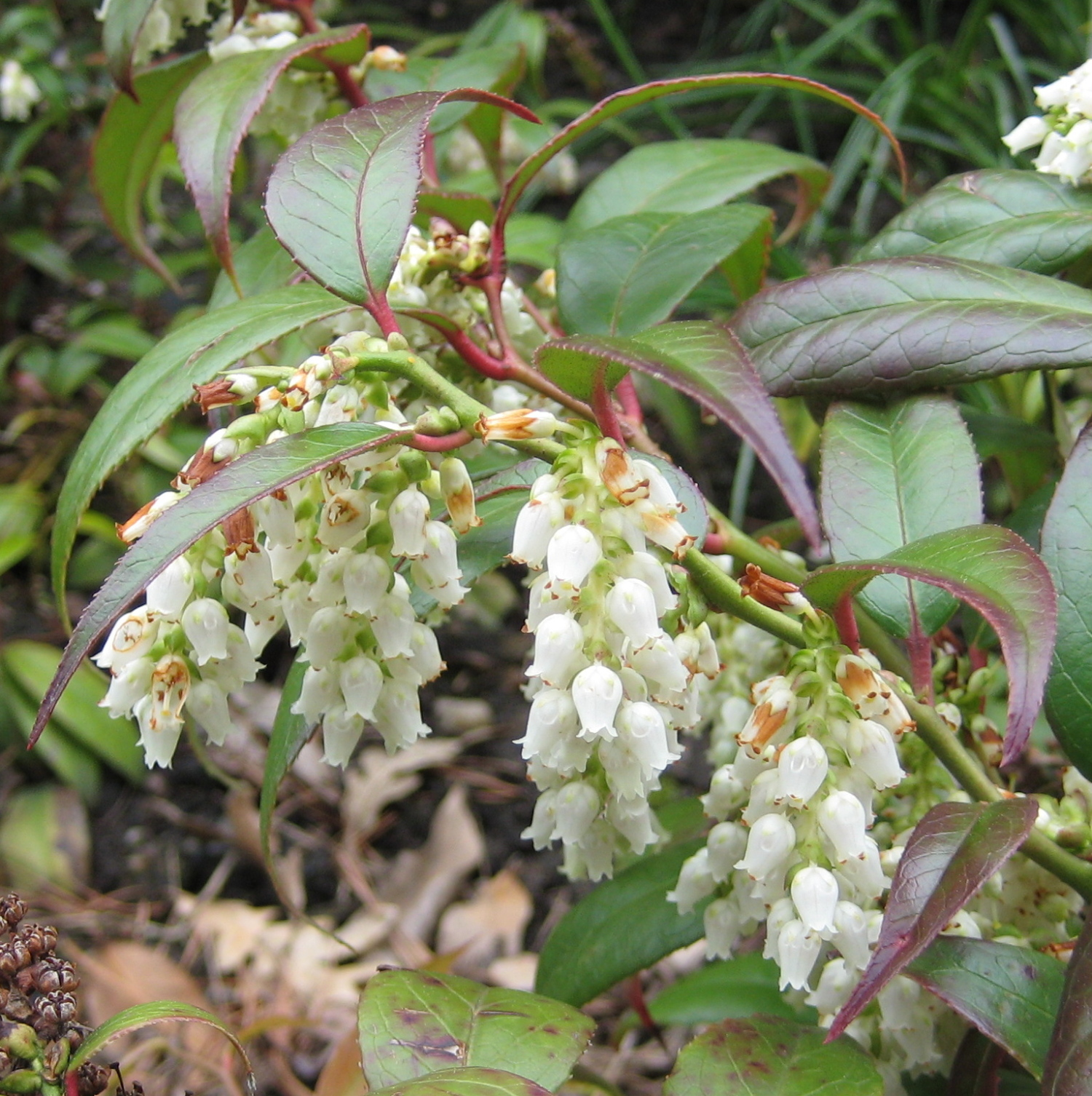 Leucothoe fontanesiana im Botanischen Garten Dresden